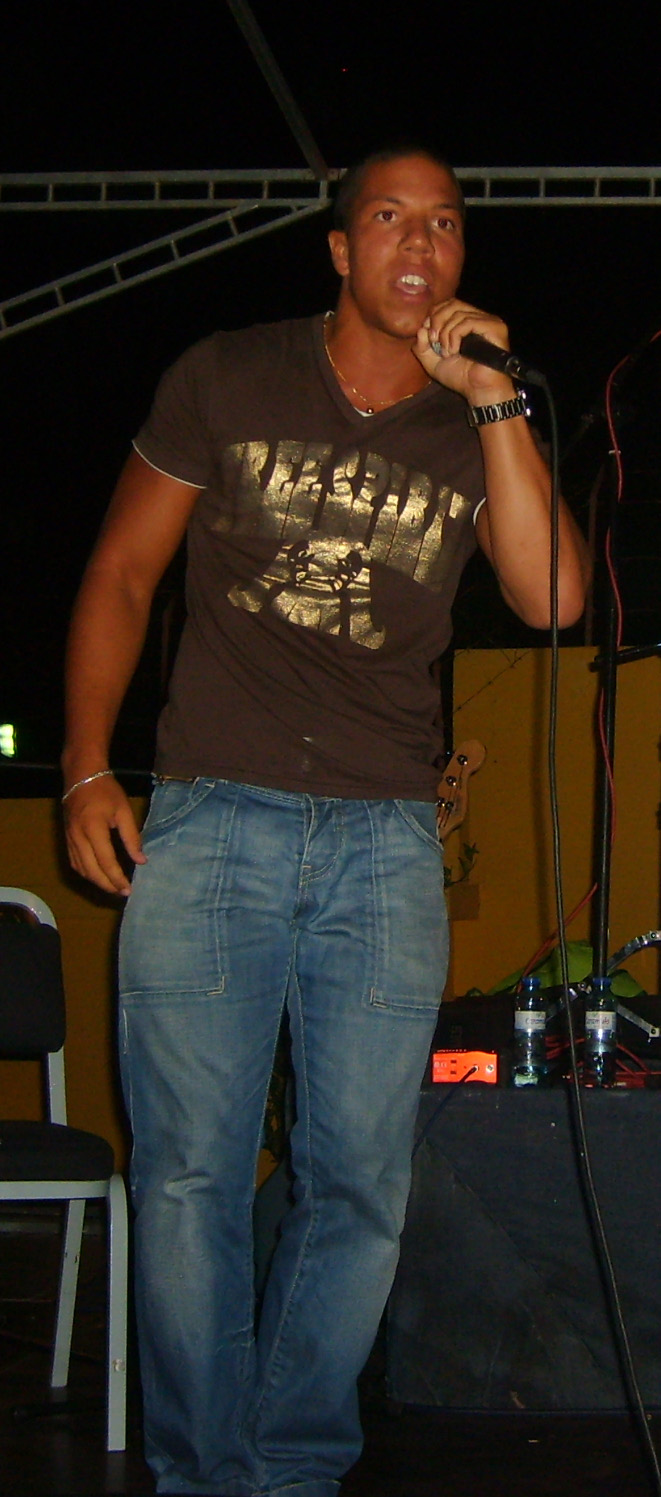 Roberto Xalino